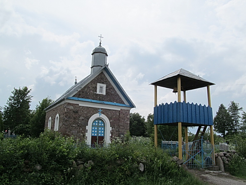 Яруцічы. Царква Раства Багародзіцы са званіцай